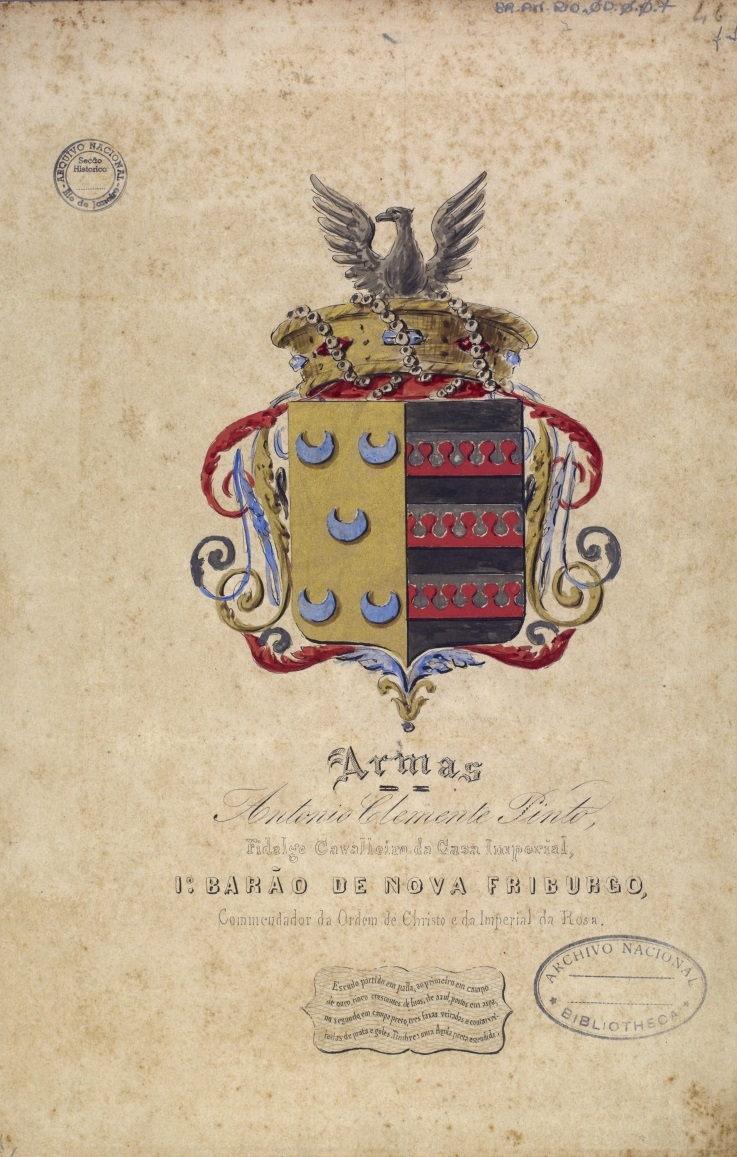 Brasão de Antônio Clemente Pinto, 1º Barão de Nova Friburgo. Fundo: Brasões.